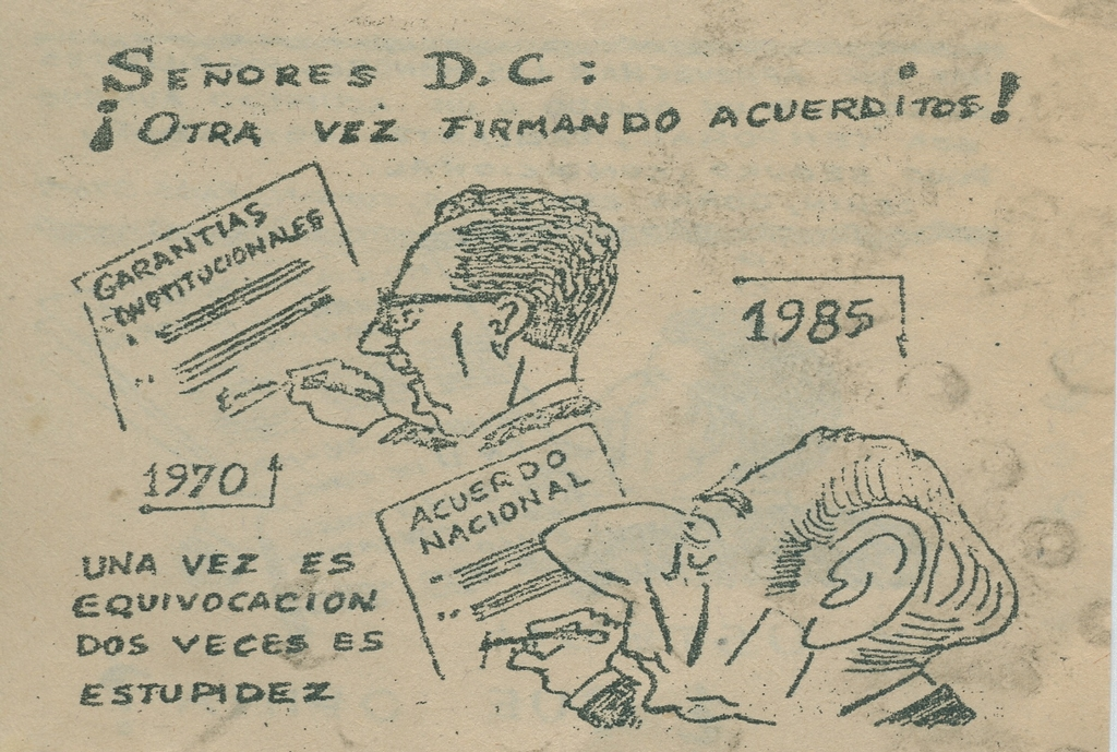 Panfleto contra al Acuerdo Nacional para la transición a la plena democracia.